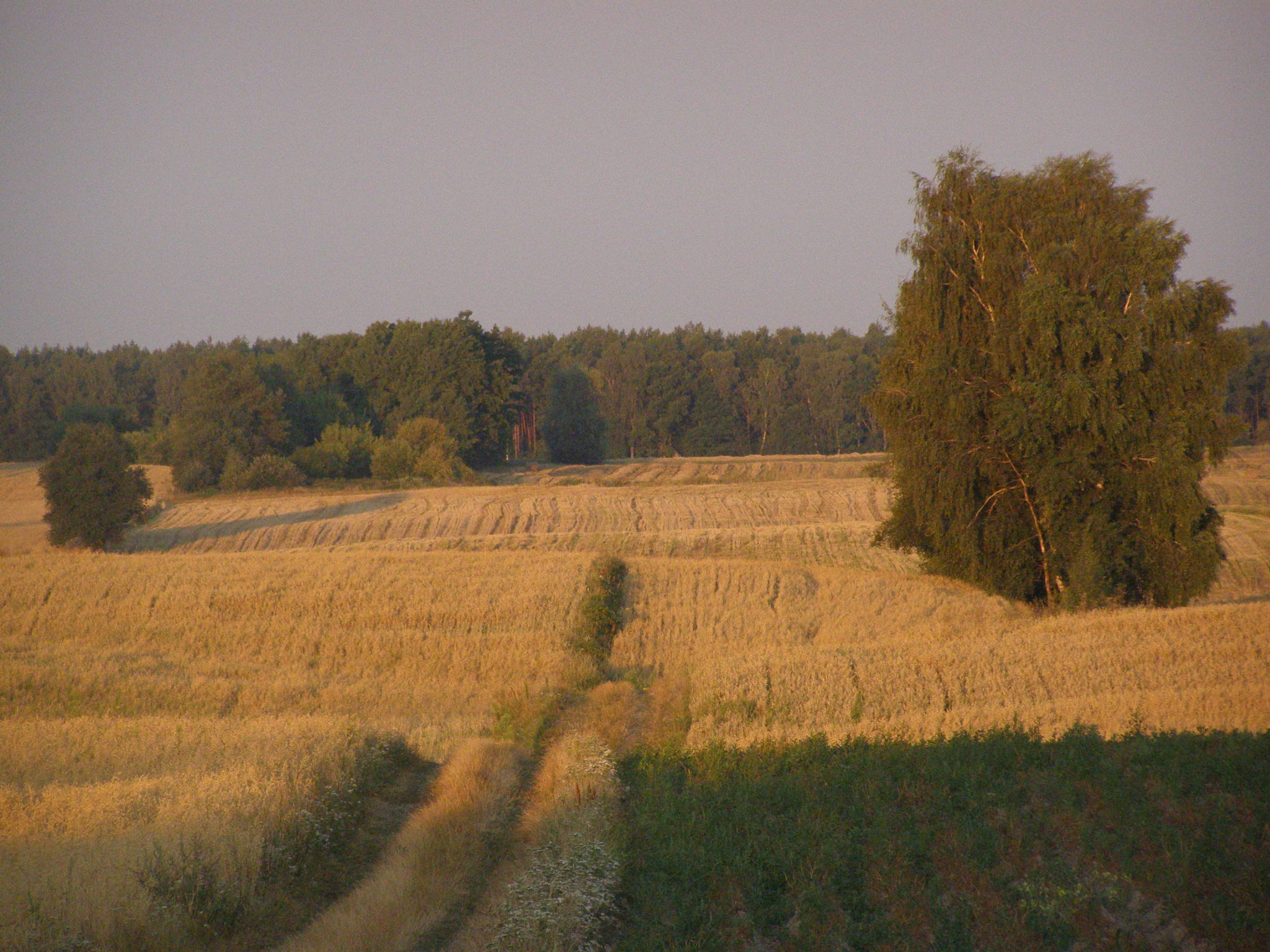 Zdjęcie zostało wykonane w miejscowości Łaś tuż po wschodzie słońca.